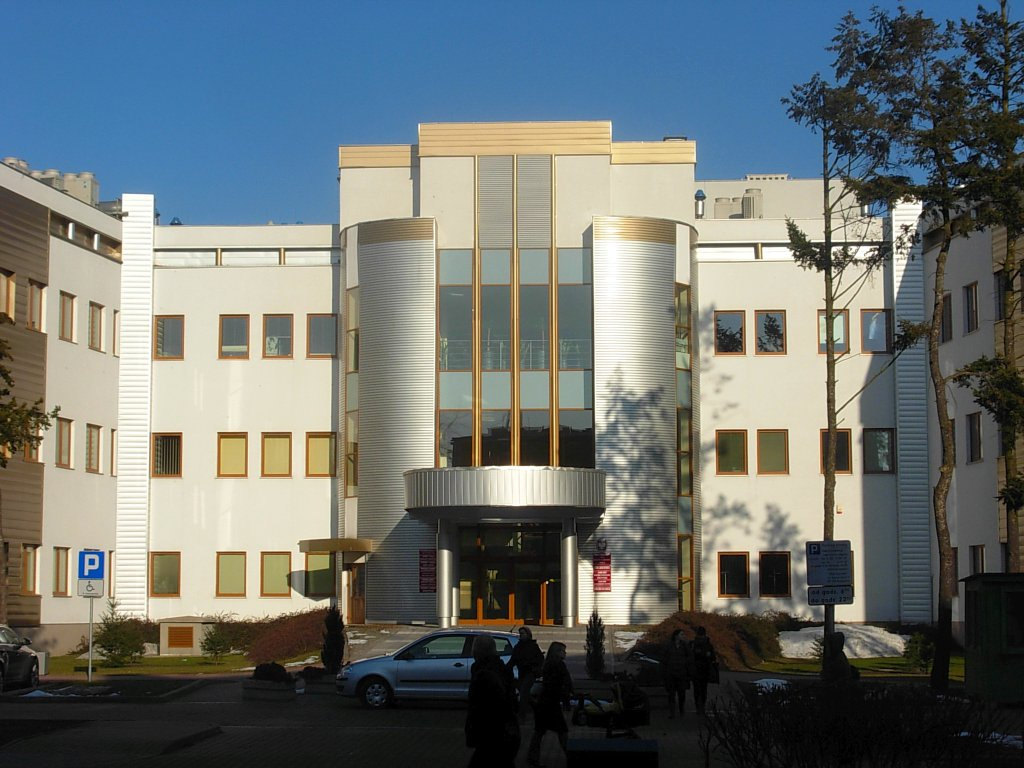 Wydział Farmacji Collegium Medicum UMK w Bydgoszczy